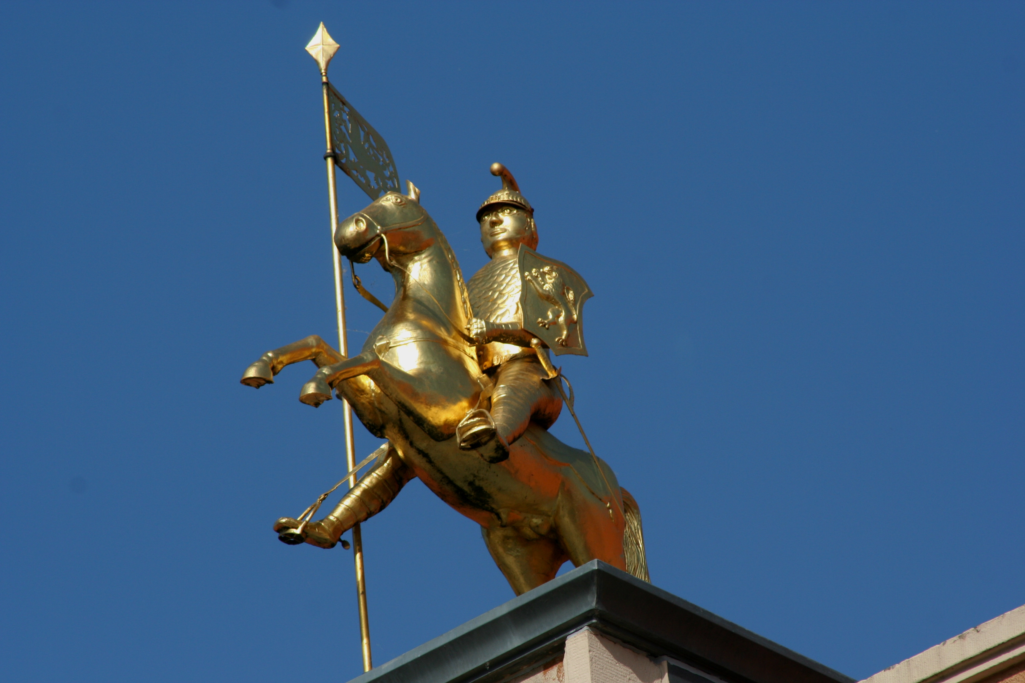 Reiterbildnis Herzog Heinrichs des Löwen, Schweriner Markt, Stadtwappen